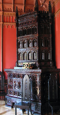 Piec w sali malinowej, Pałac w Starejwsi